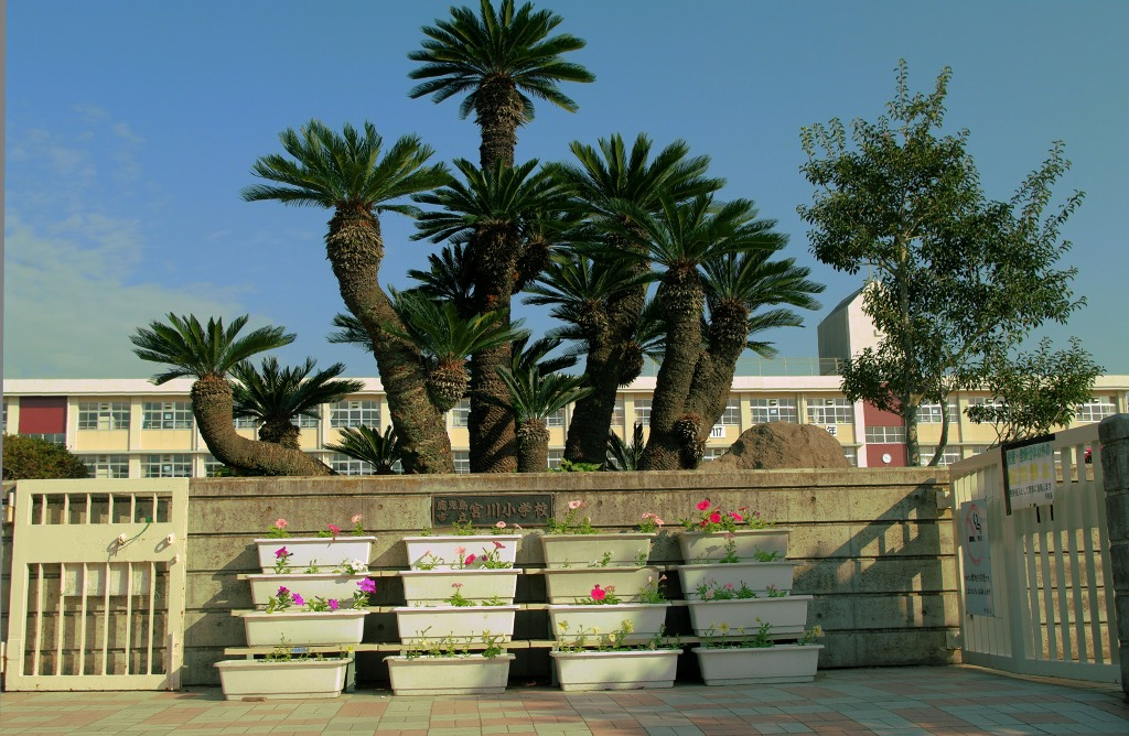 鹿児島市立宮川小学校の外観。